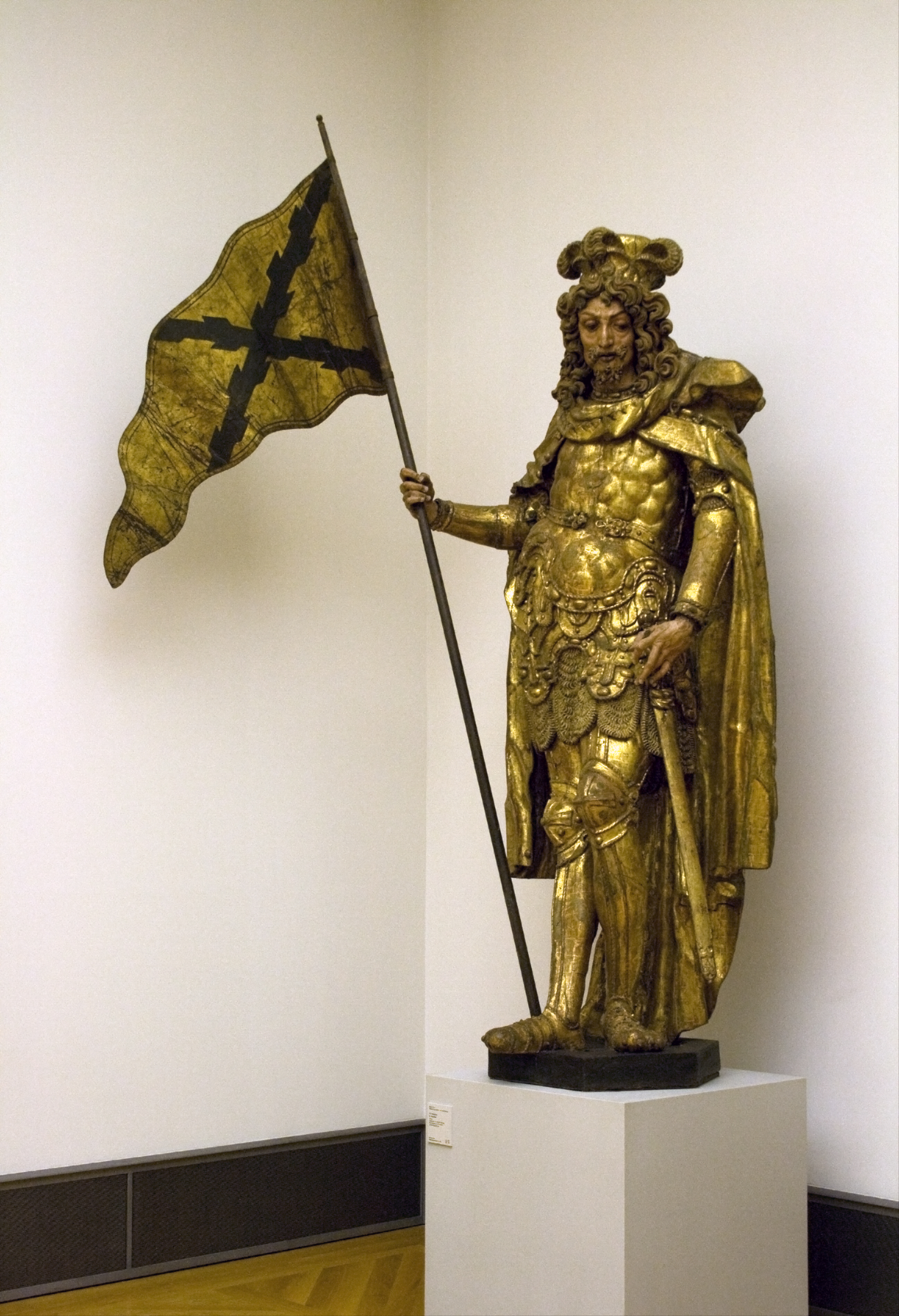 Hl. Sebastian; Lindenholz mit originaler Fassung; vom Hochaltar von Pfarrkirche zu Wasserburg am Inn. 1638/1639, Skulpturensammlung (Inv. 3/58, erworben 1958); Bode-Museum, Berlin.